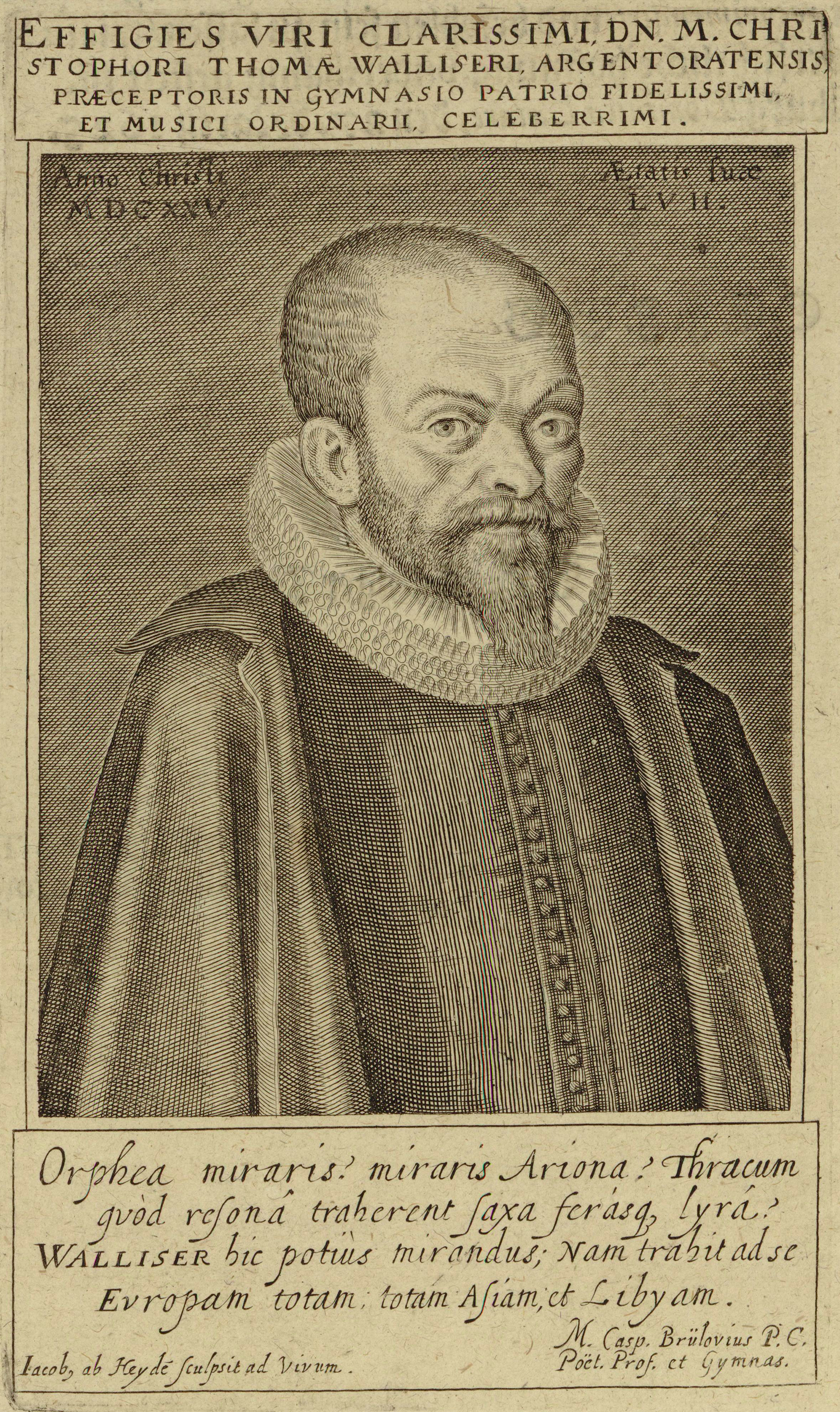 Christophori Thomae Walliseri, Argentoratensis praeceptoris in gymnasio patrio fidelissimi, et musici ordinarii celeberrimi / Iacob, ab Heydé sculpsit ad vivum. 1625. Bibliothèque nationale de France